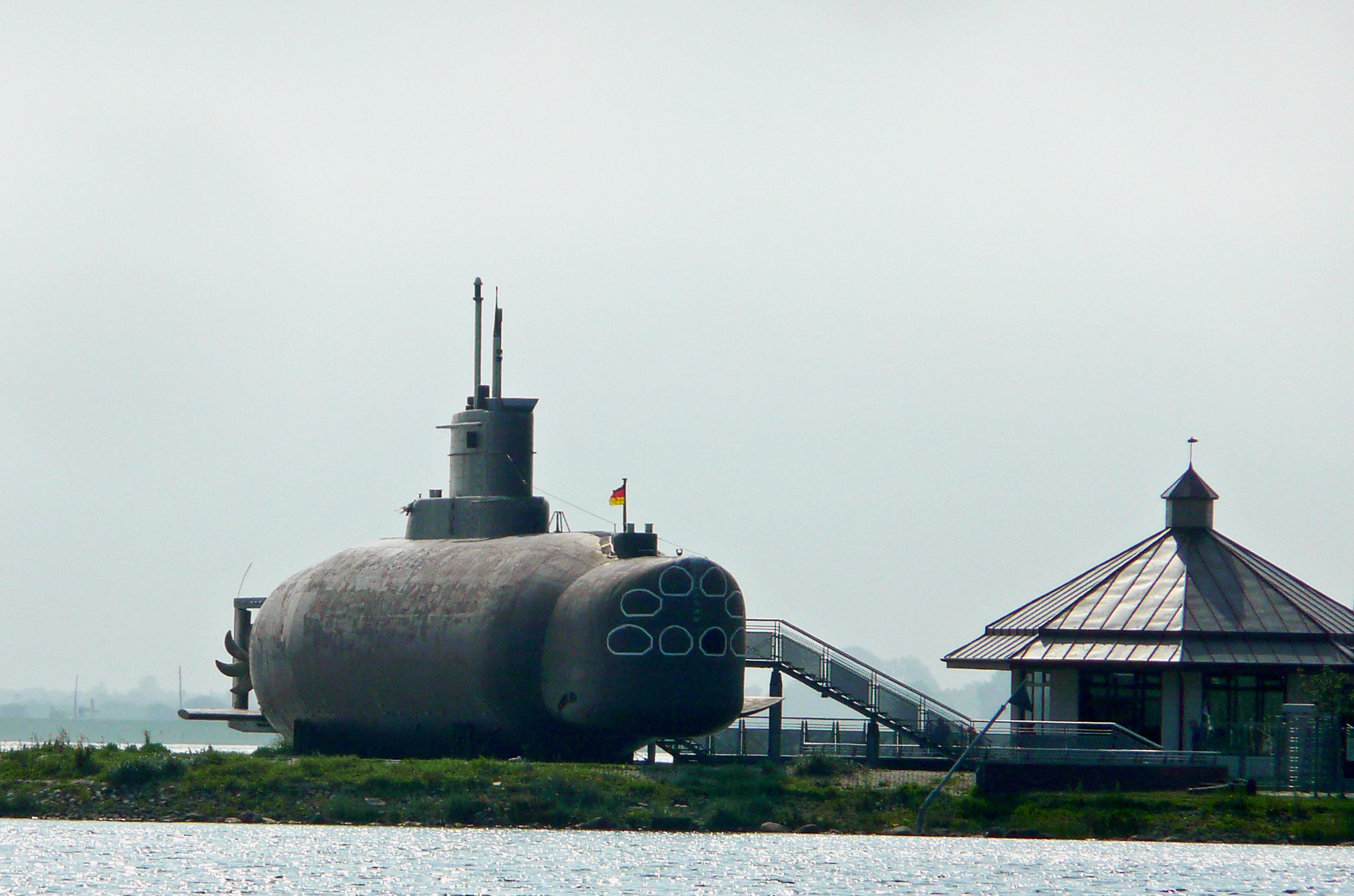 Die Steuerbordseite der U11 mit Teleobjektiv fotografiert. Rechts am Bildrand ist das U-Bootmuseum zu sehen.